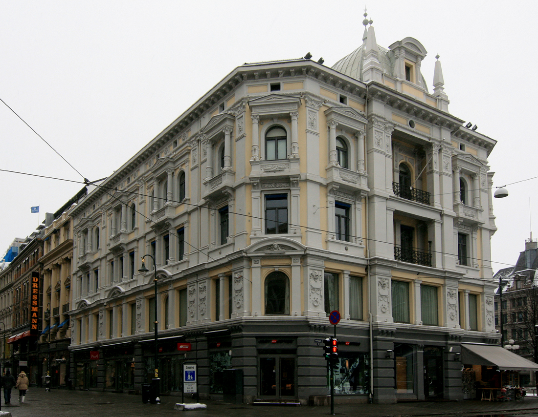 Koppgården, Stortorvet 2, Oslo. Fasade også mot Karl Johans gate og Kirkegata. Oppført i 1879-80 for vinhandler Hermann Alexander Kopp, etter tegninger av arkitekt Wilhelm von Hanno.